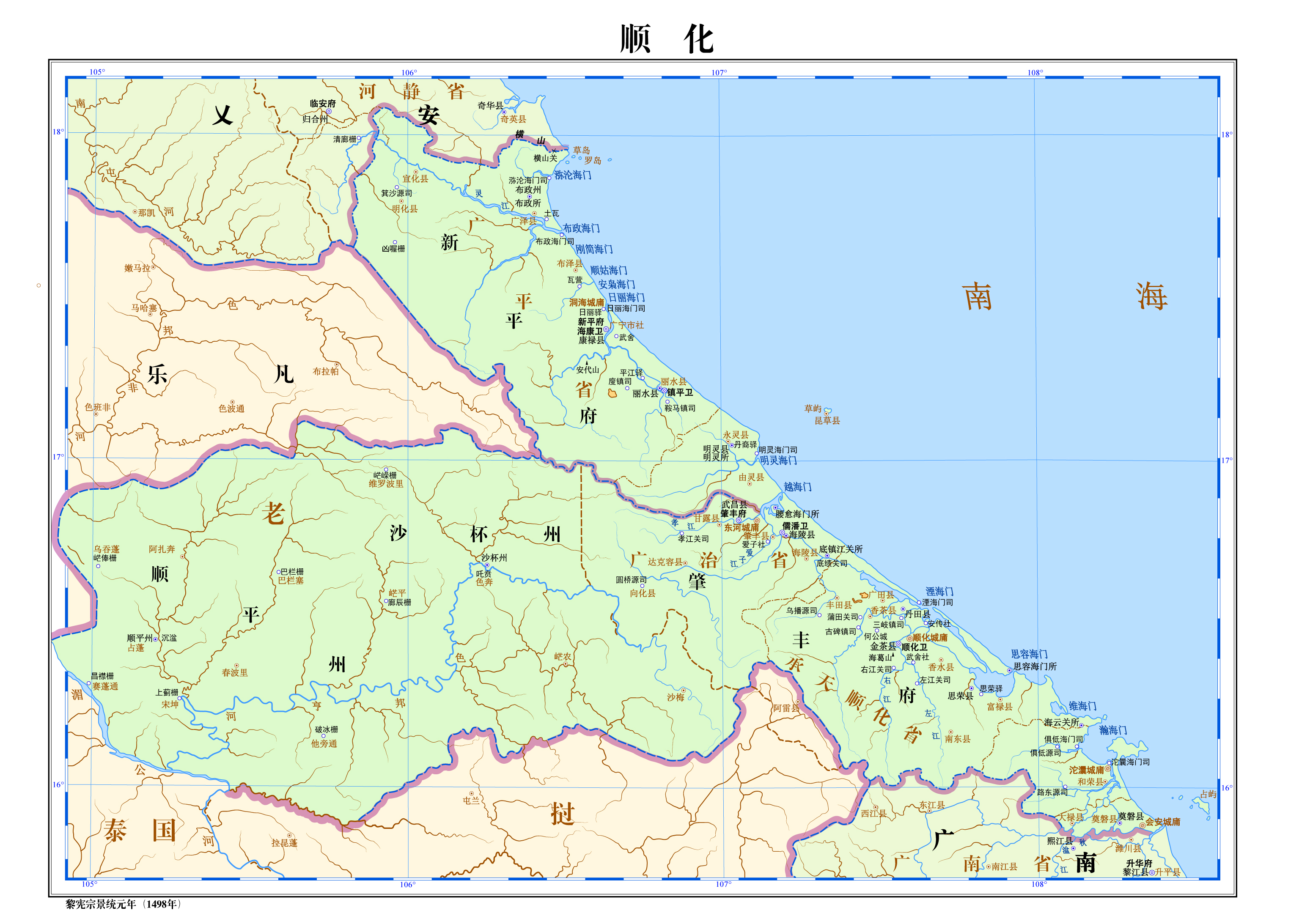 越南后黎朝景统元年（1498年），顺化地区。16世纪初，顺化三司镇城大约在金茶县一带。